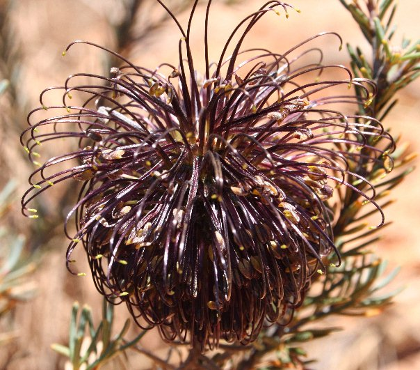 Banksia violacea